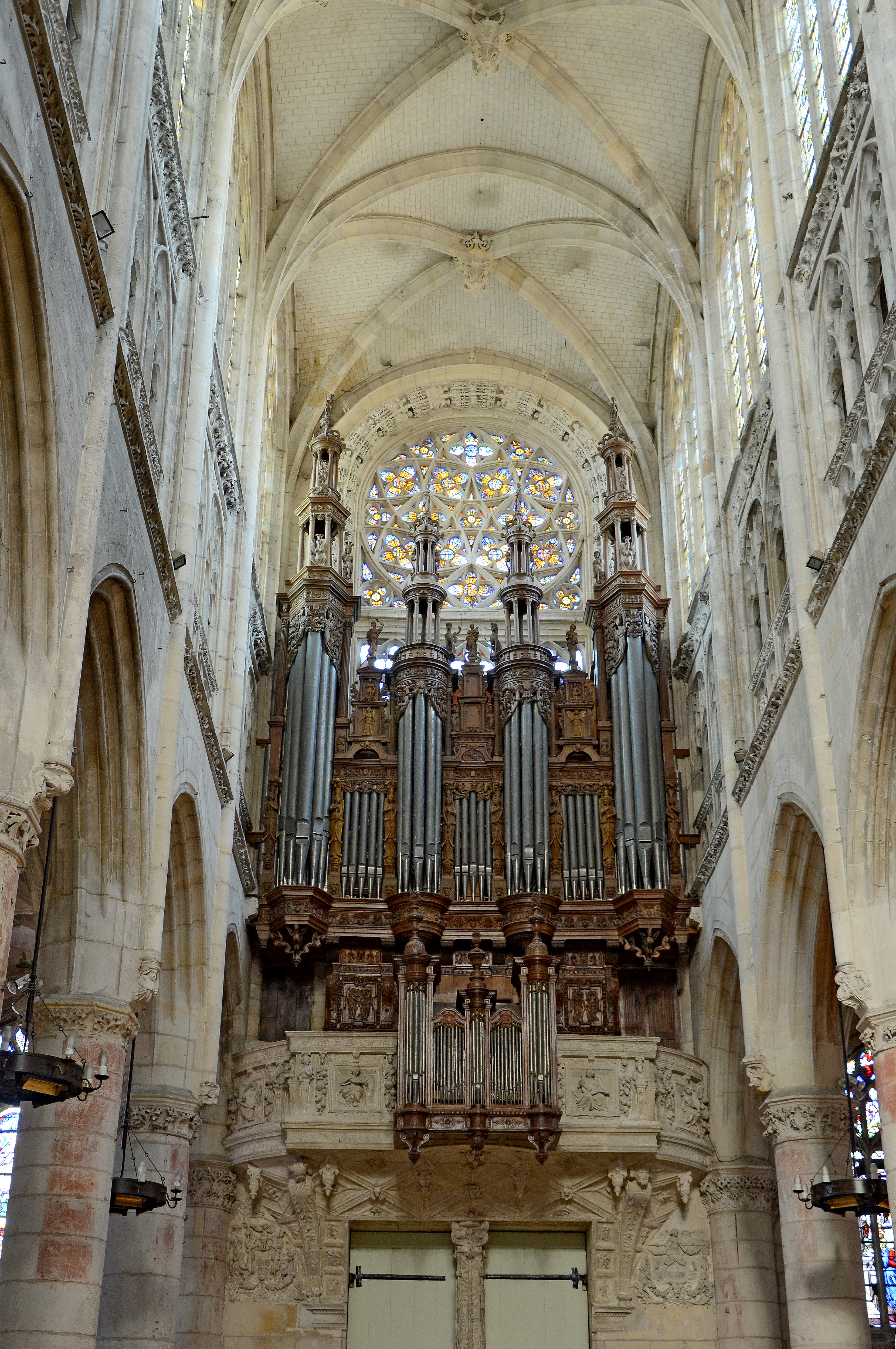 Église Notre-Dame de Caudebec-en-Caux, Seine Maritime, France